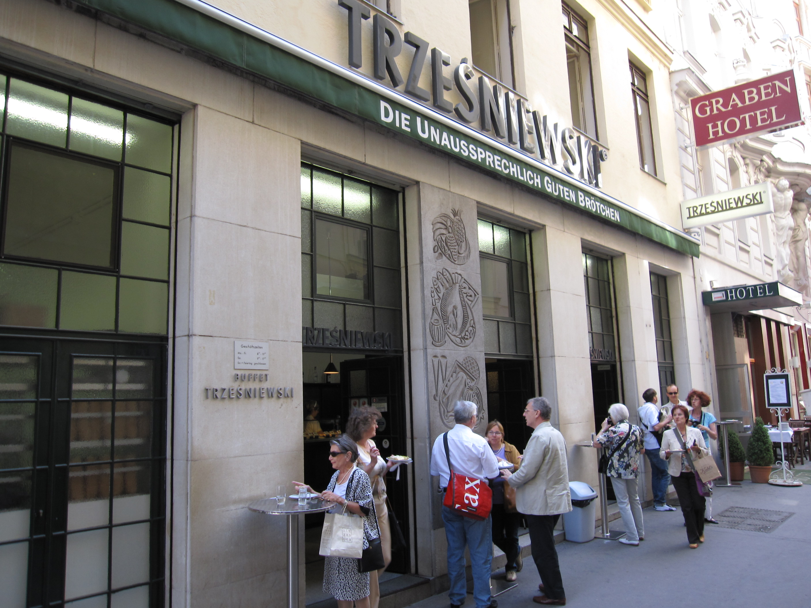 Trześniewski at Dorotheergasse, Vienna's I. district.